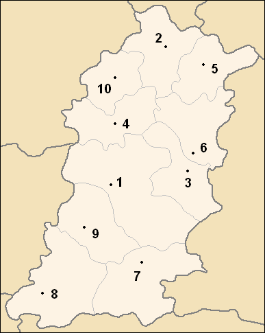 Sujet : carte des obchtini (municipalités) de l' :fr:Choumen (oblast)|oblast de Choumen , en :fr:Bulgarie Auteurs : * :fr::bg:Потребител:Ljubo (Любомир Таушанов = Lyoubomir Taouchanov), pour la version originale en bulgare, * :fr:Utilisateur:Hégésippe Cormier , pour l'adaptation française (repères chiffrés) Source : :fr::bg:Картинка:Sumen Oblast map.PNG (22 mai 2005) Licence